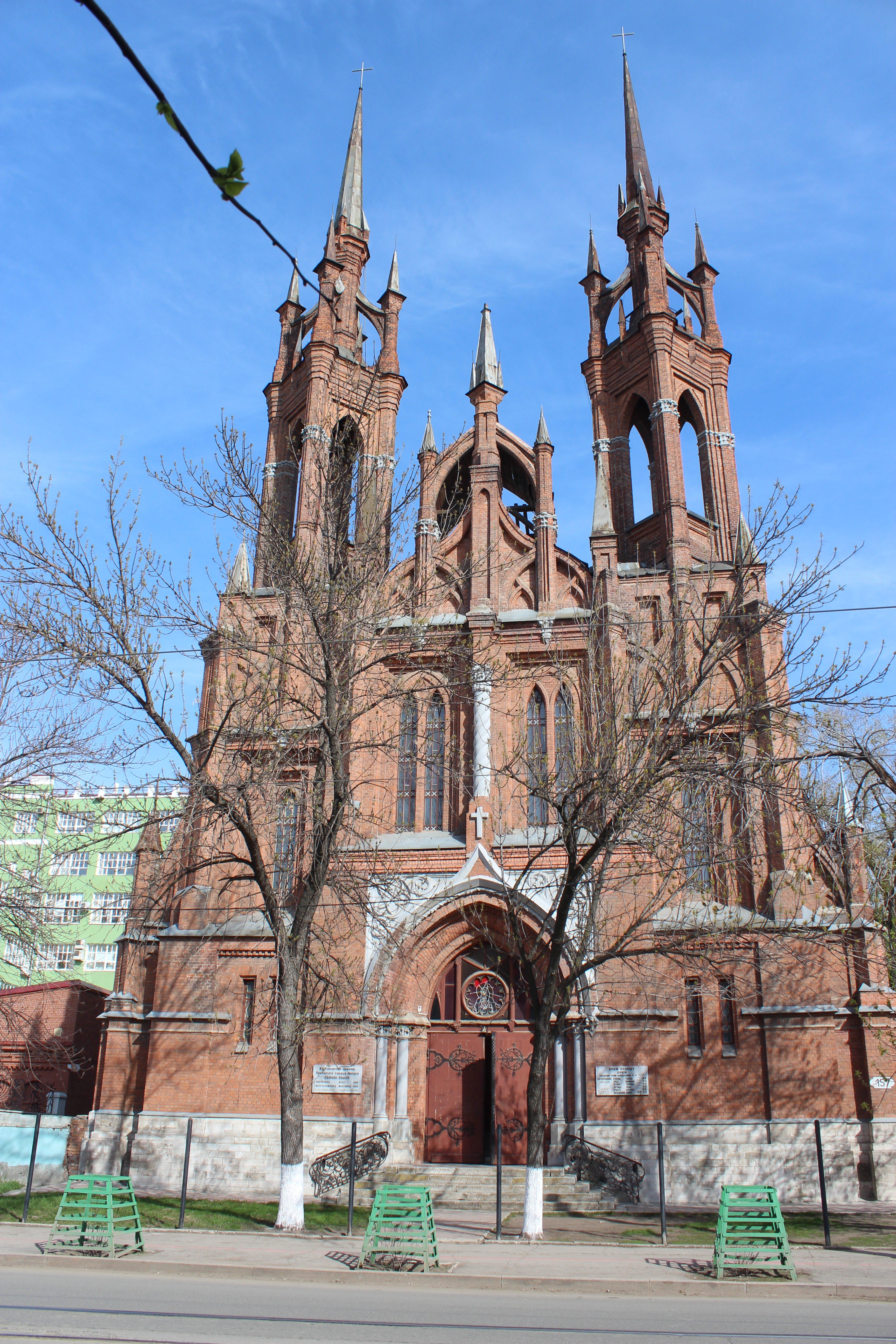 Костел Польский (Самарская область, Самара, Фрунзе улица, 157, лит. 1, 2, 3)